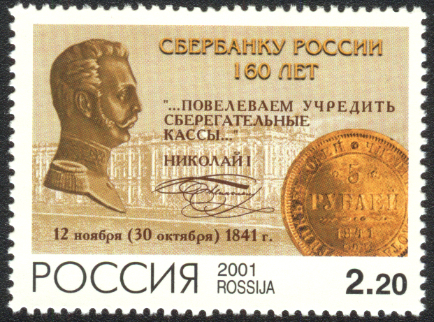 Почтовая марка России - 160 лет Сбербанку России